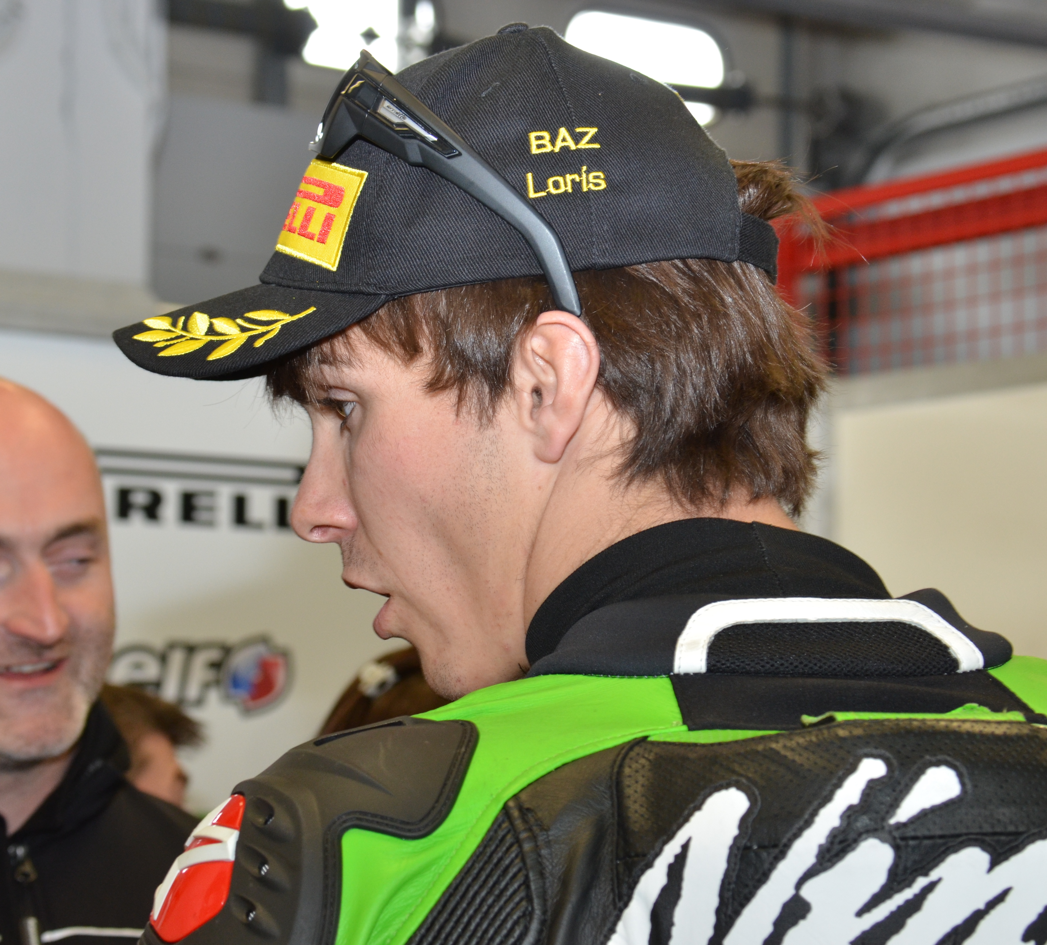 Bol d'Or 2013